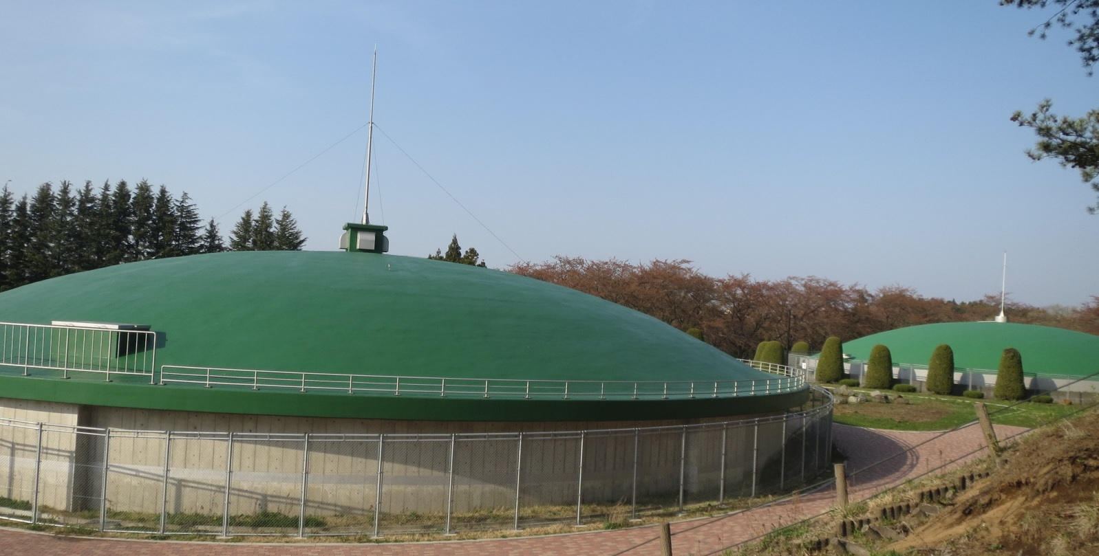 蟹沢水道公園にある配水池